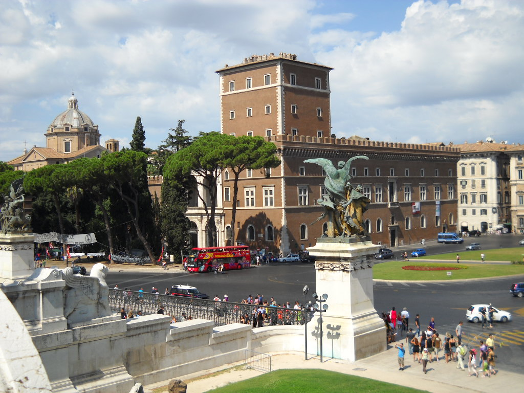 Palazzo Venezia in Roma. La cupola sullo sfondo è della chiesa del Gesù